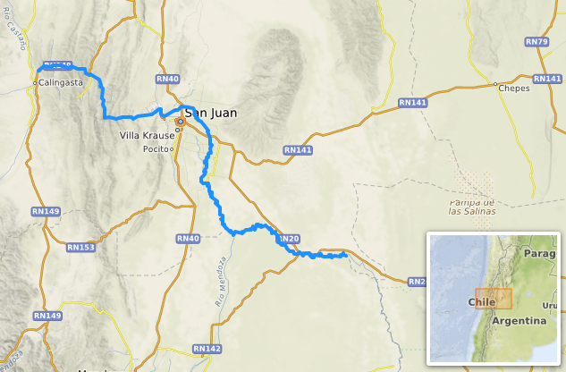 carte réalisée sur umap [1] This map may be incomplete, and may contain errors. Don't rely solely on it for navigation.